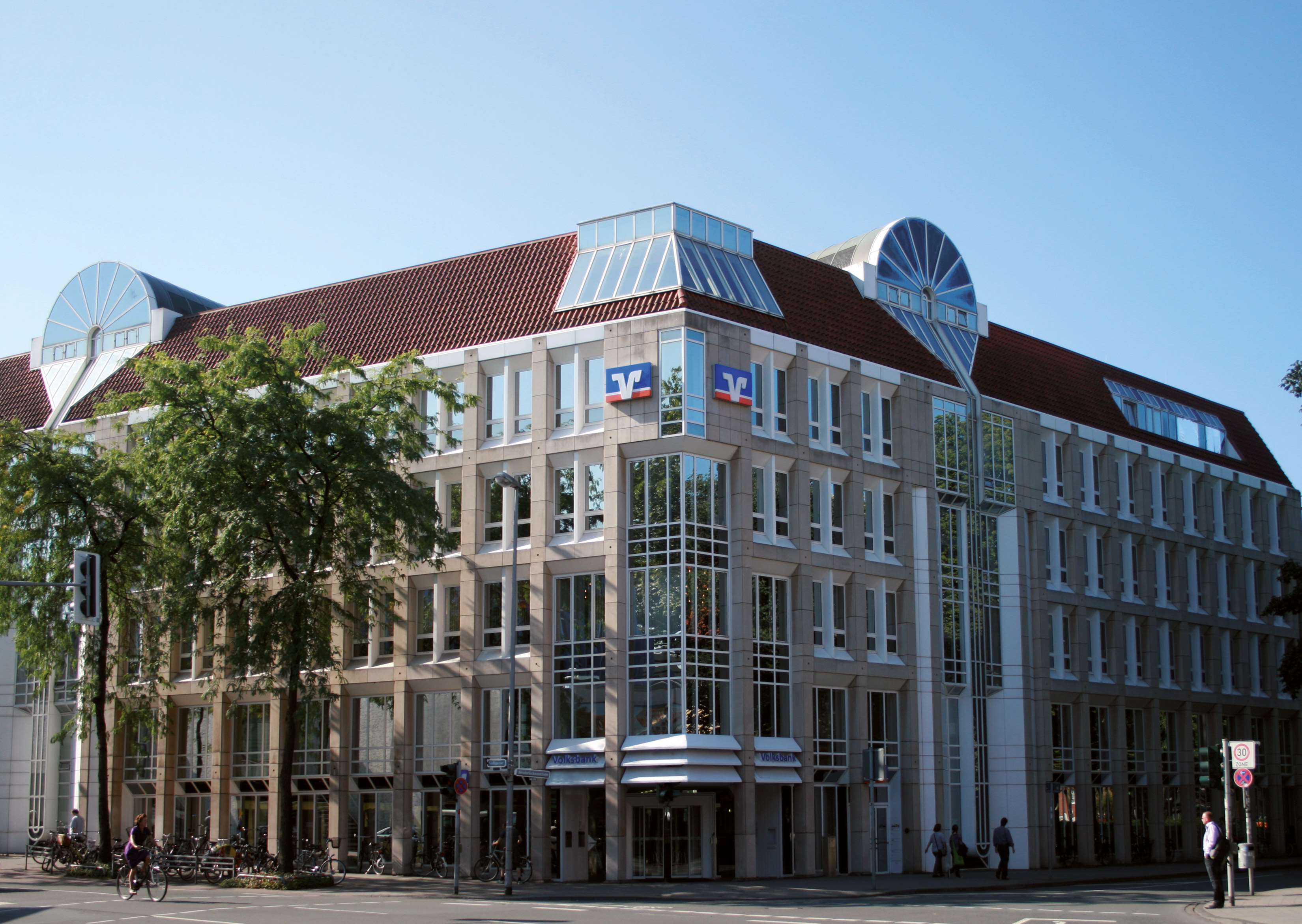 Hauptstelle der Vereinigte Volksbank Münster